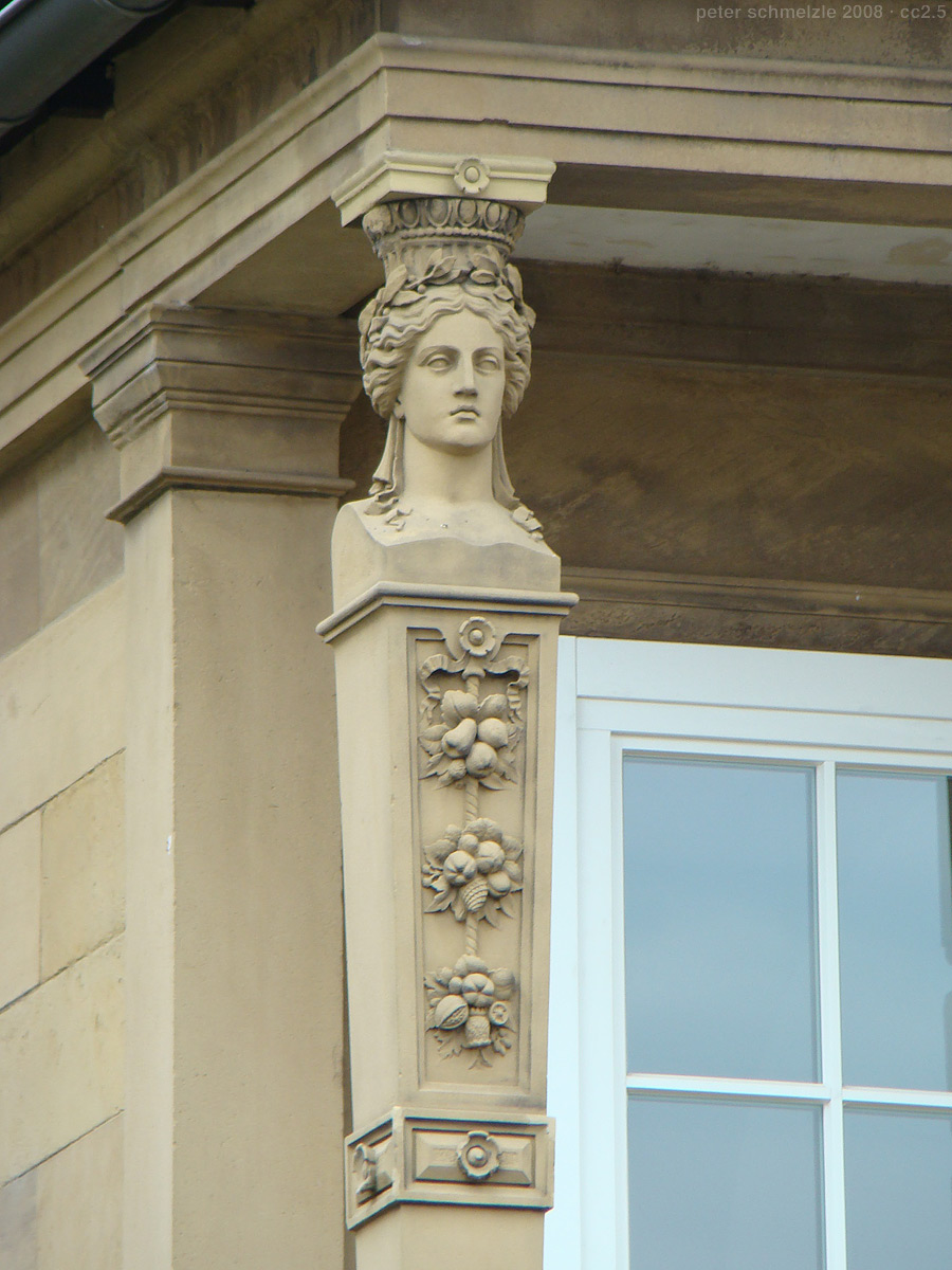 Herme in der Villa Adelmann, Bahnhofstr. 11 in Heilbronn